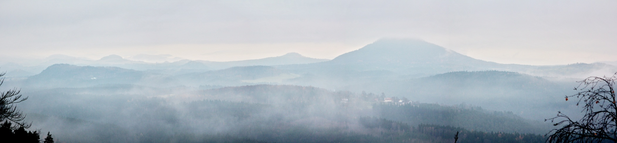 Panorama s Růžovským vrchem od Pravčické brány.